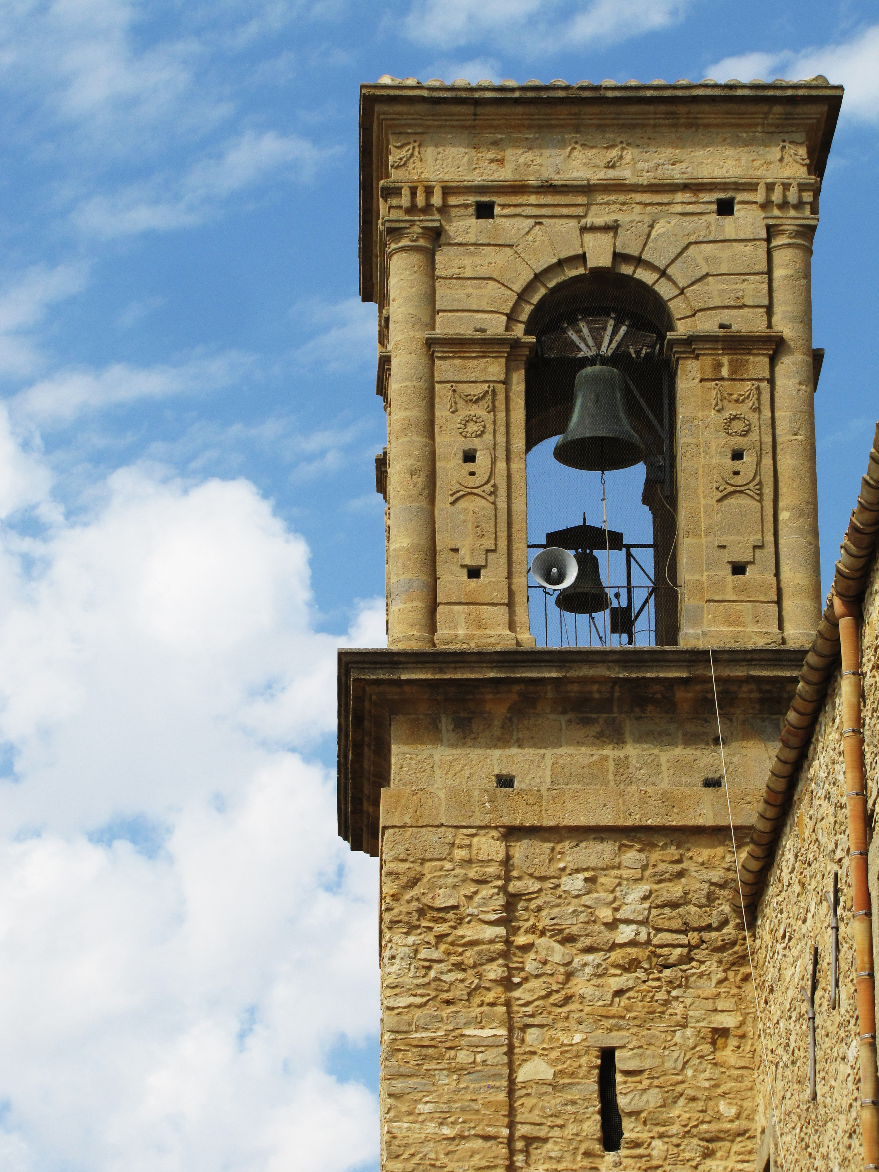 Chiesa di Sant'Antonio da Padova This is a photo of a monument which is part of cultural heritage of Italy.